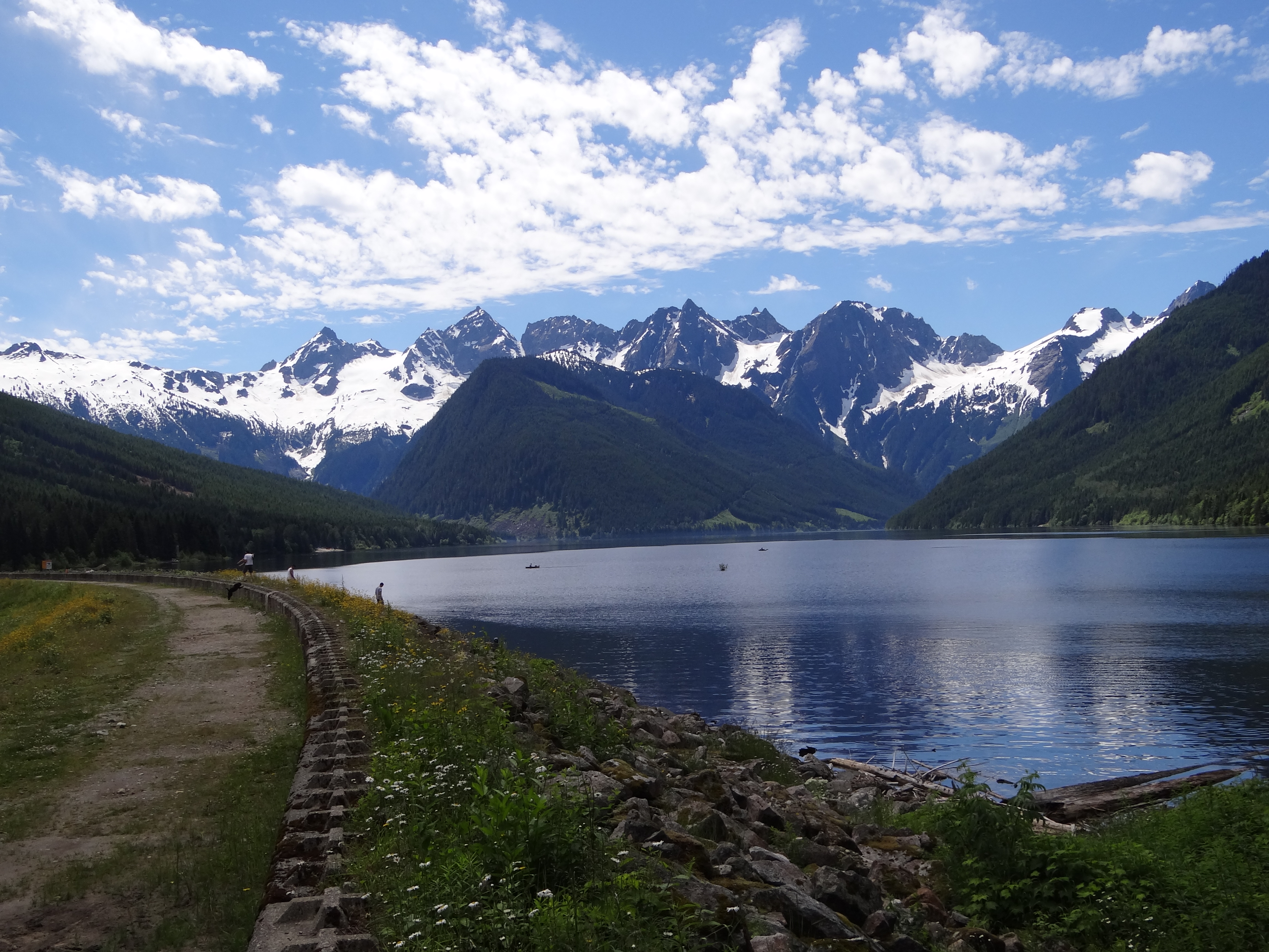 jones lake